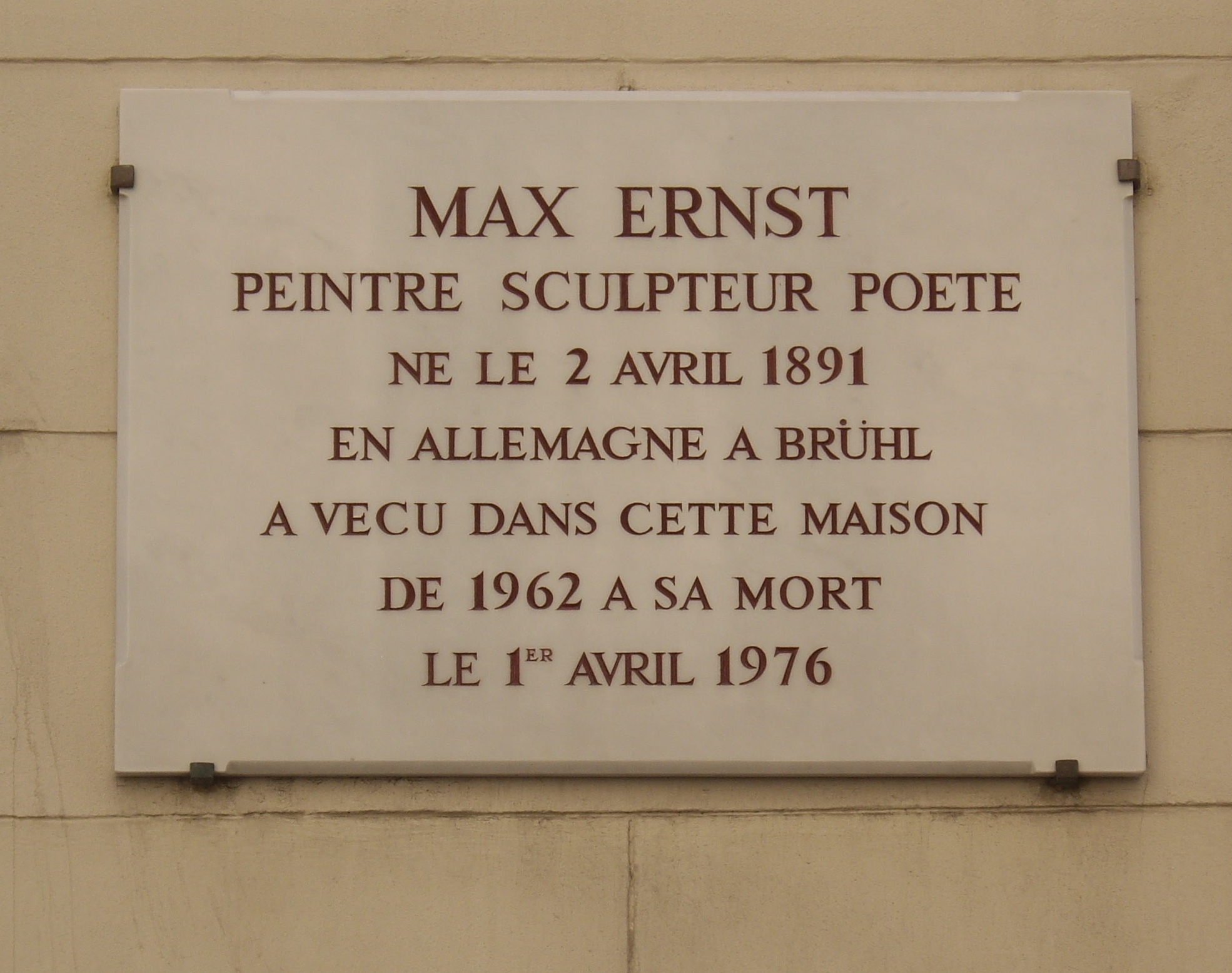 Plaque apposée au n° 19 de la rue de Lille, Paris 7e, où le peintre et sculpteur Max Ernst (1891-1976) vécut de 1962 à sa mort.